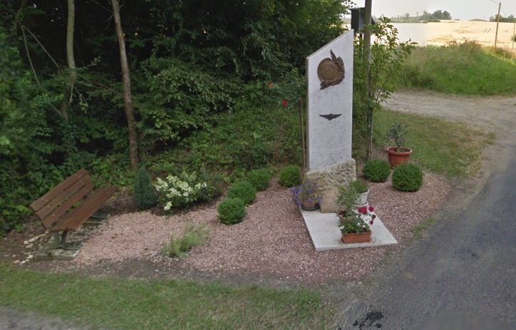 Stèle en hommage aux huit militaires italiens décédés dans l'accident de leur hélicoptère Agusta HH-3F en octobre 2008. (photo prise en 2013)